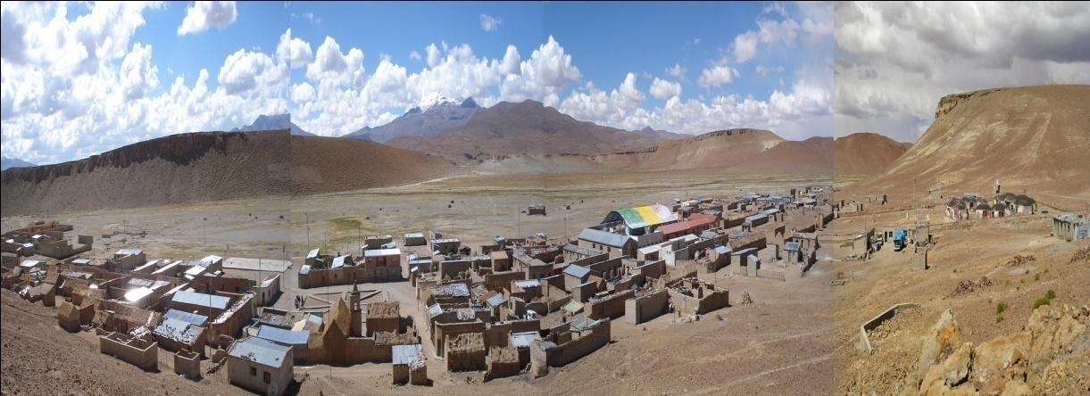 Vista panorámica de Quetena Chico, Municipio San Pablo de Lípez, Provincia de Sud Lípez. Departamentode Potosí